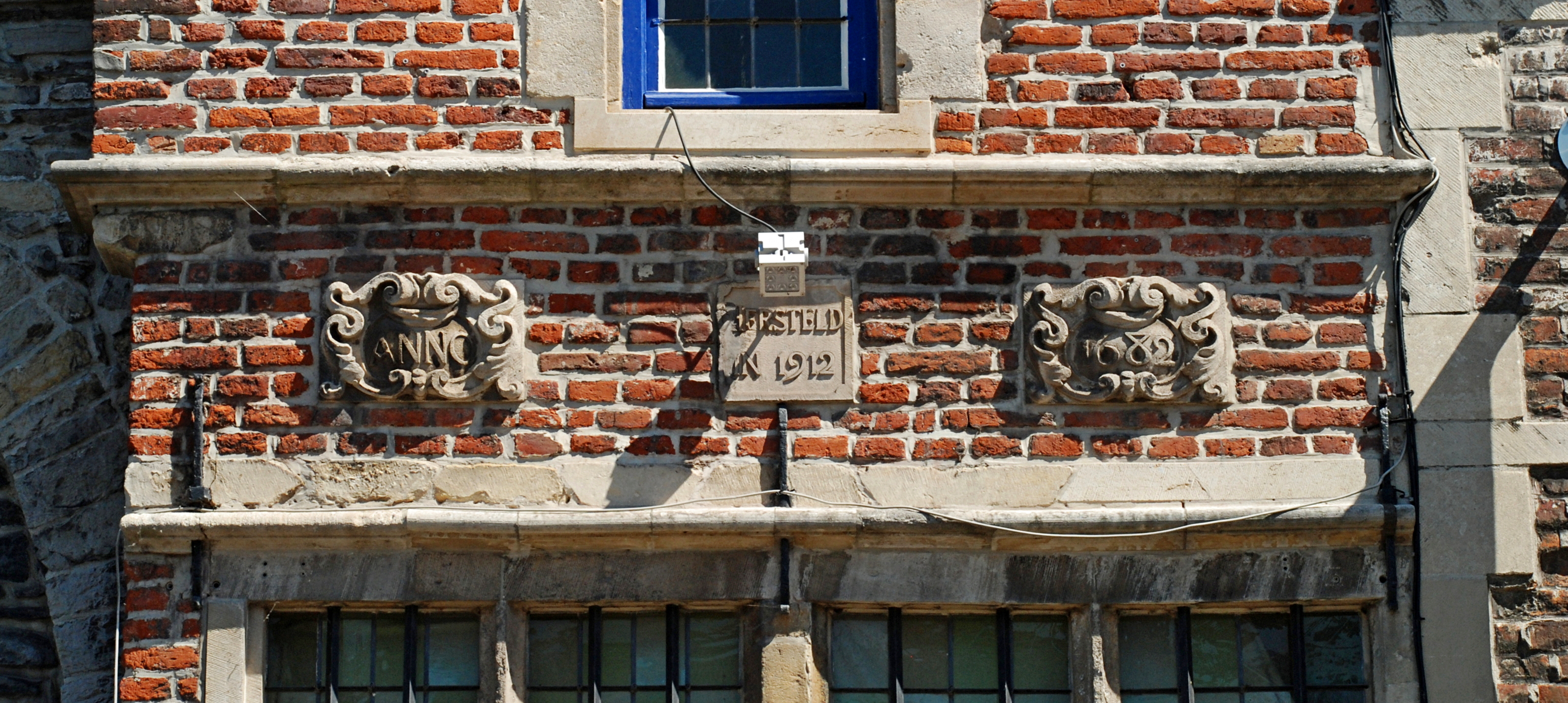 Belgique - Gand - Quai aux Herbes (Graslei) - Maison du Tonlieu (Tolhuisje)